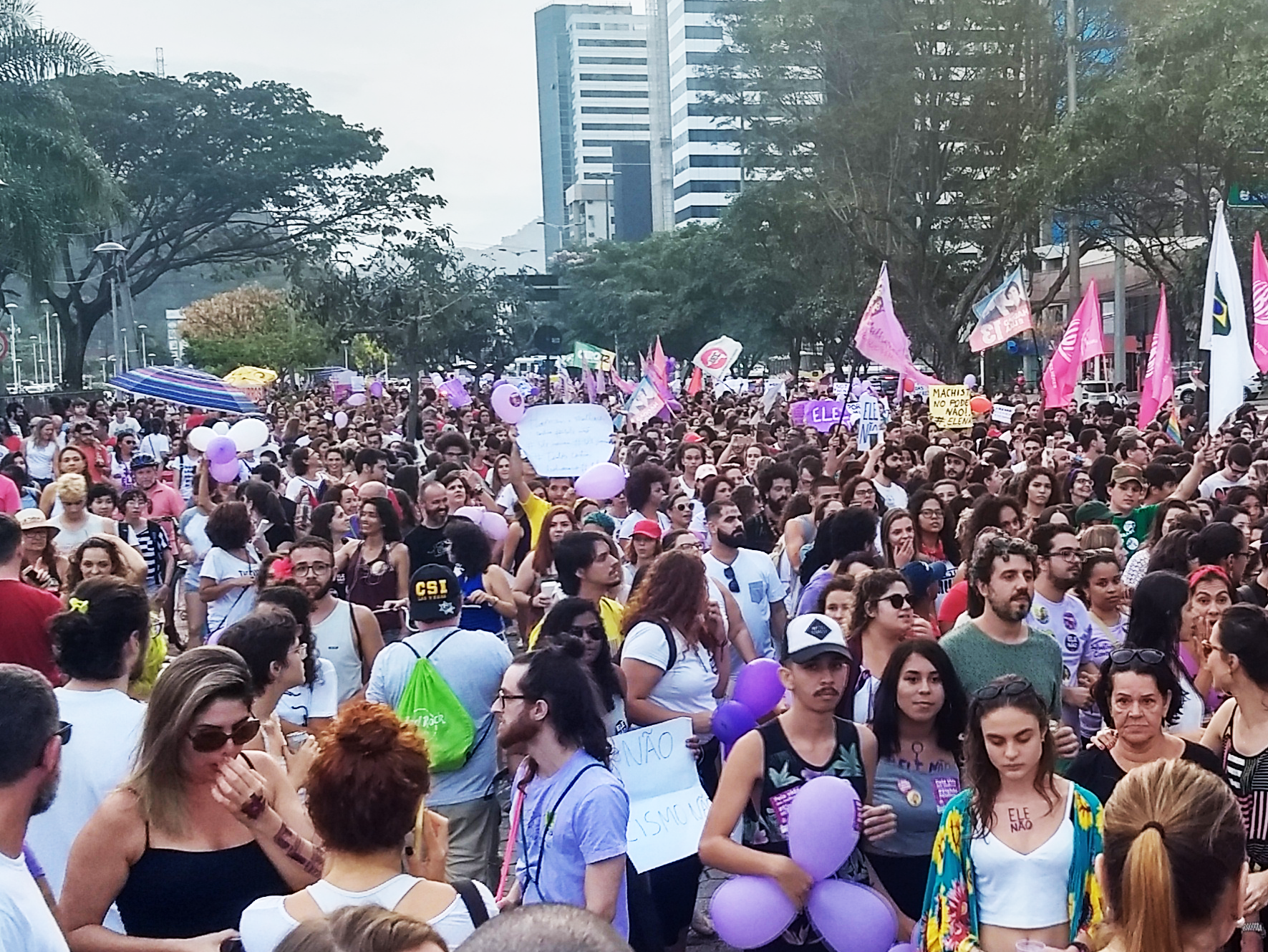 Manifestação #EleNão contra o candidato a presidente do Brasil Jair Bolsonaro, em Vitória.